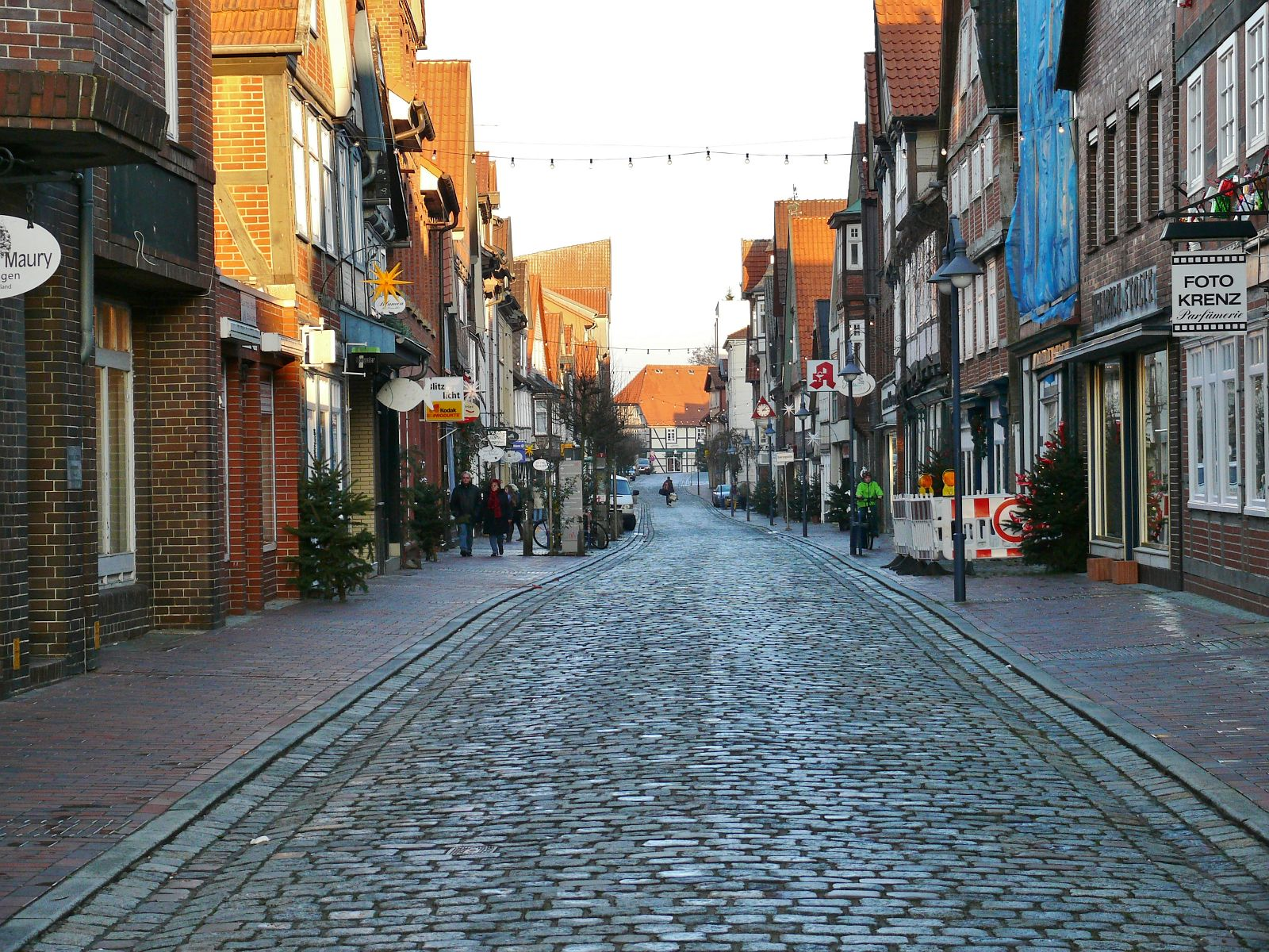 Blick in die Lange Straße Richtung Marktplatz, in Dannenberg (Elbe).